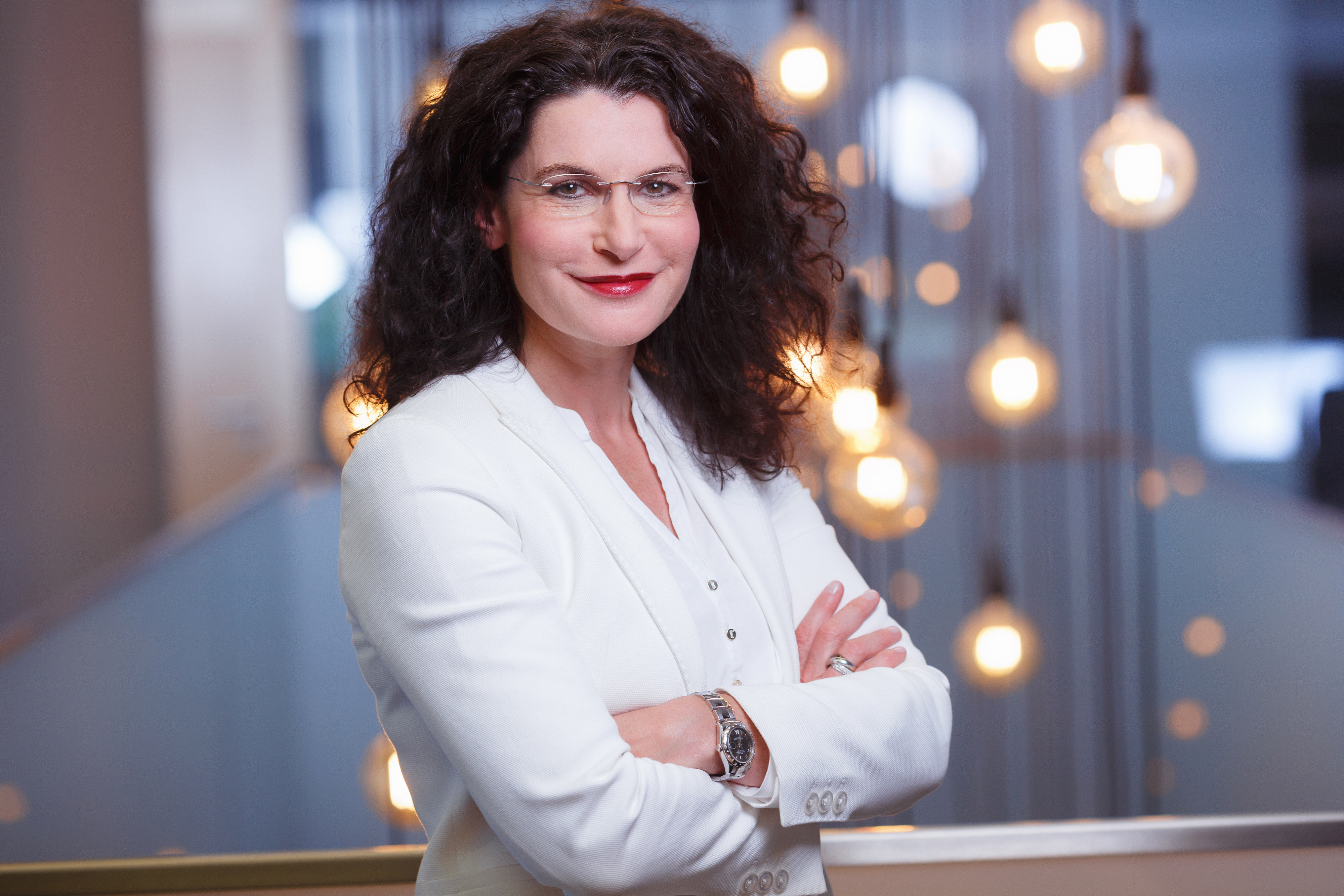 Portrait of Tina Müller, Group CEO Douglas GmbH